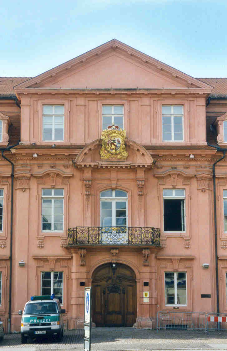 Offenburg: ehemaliger Königshof, ein barockes Prachtwerk. Mittelrisalit (Vorderseite) des Stadtpalais, welches in Baden zu den schönsten seiner Art zählt.